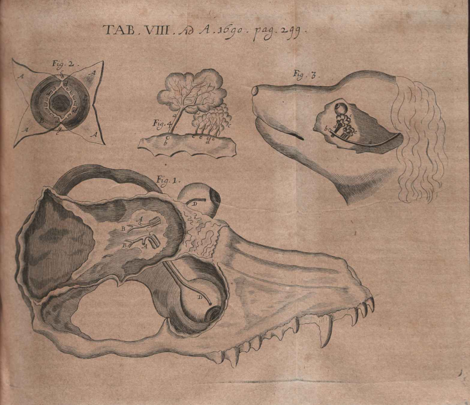 Illustration